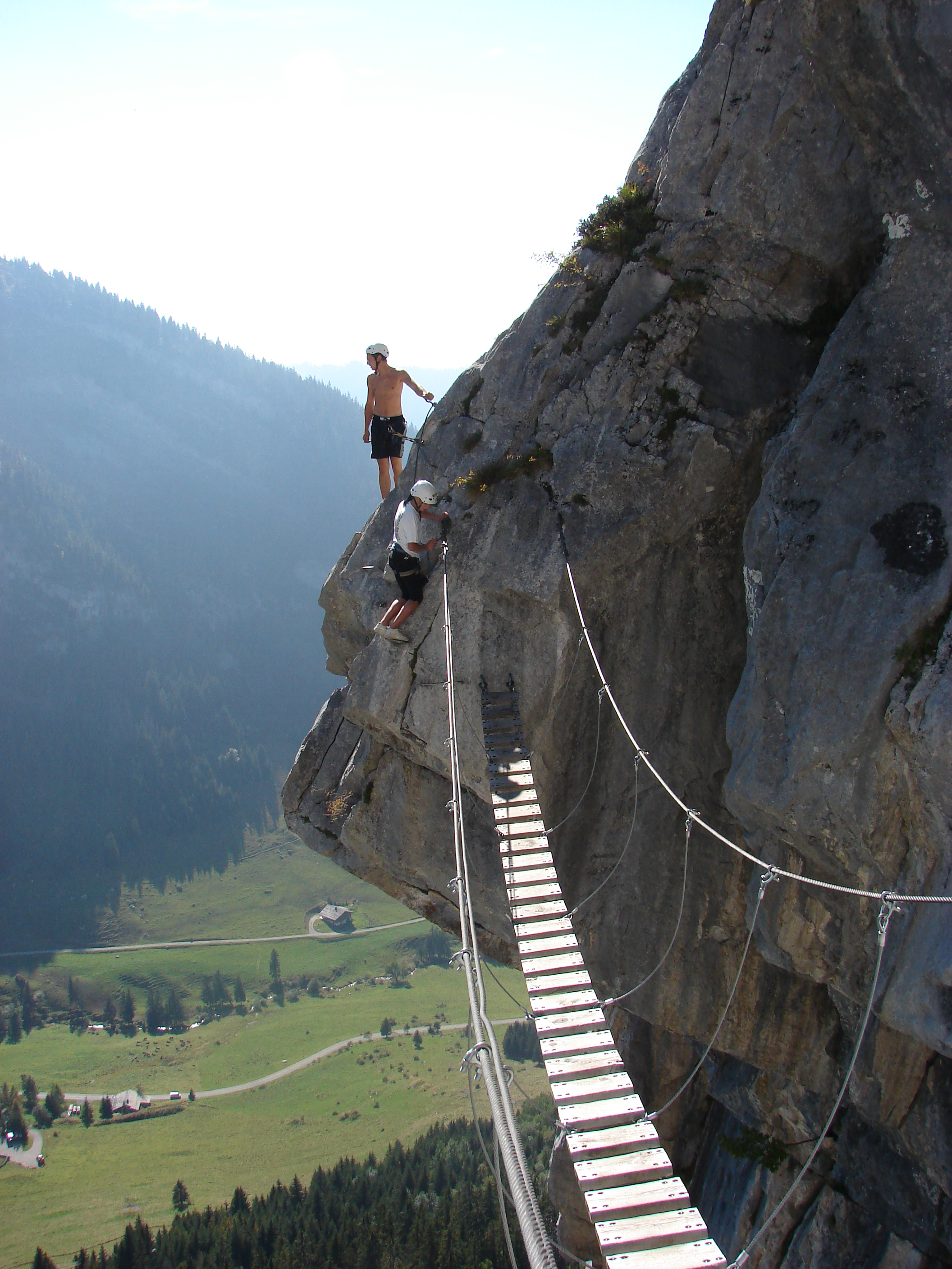 Via Ferrata route near La Clusaz